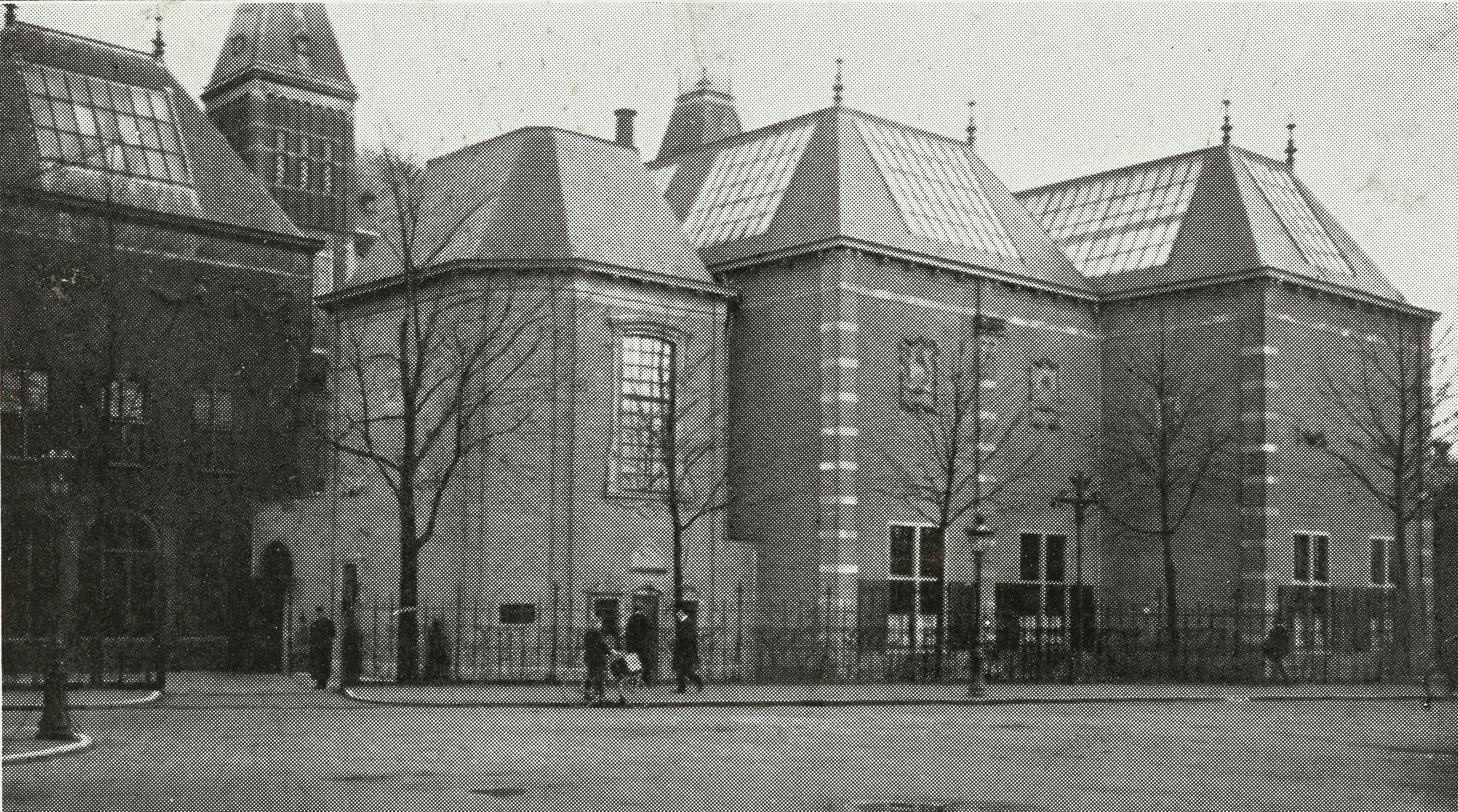 Druckeruitbouw, gezien vanuit het zuidwesten. De bouw van de Druckeruitbouw, ontwerp Jos Cuypers, startte in 1906, in 1908 was het gebouw 'kap- en glasdicht'. In de gevel zijn verschillende architectuurfragmenten verwerkt. Links het tussen 1885 en 1897 gebouwde Fragmentengebouw, naar ontwerp van P.J.H. Cuypers. In 1913 werd gestart met de tweede fase van de Druckeruitbouw.